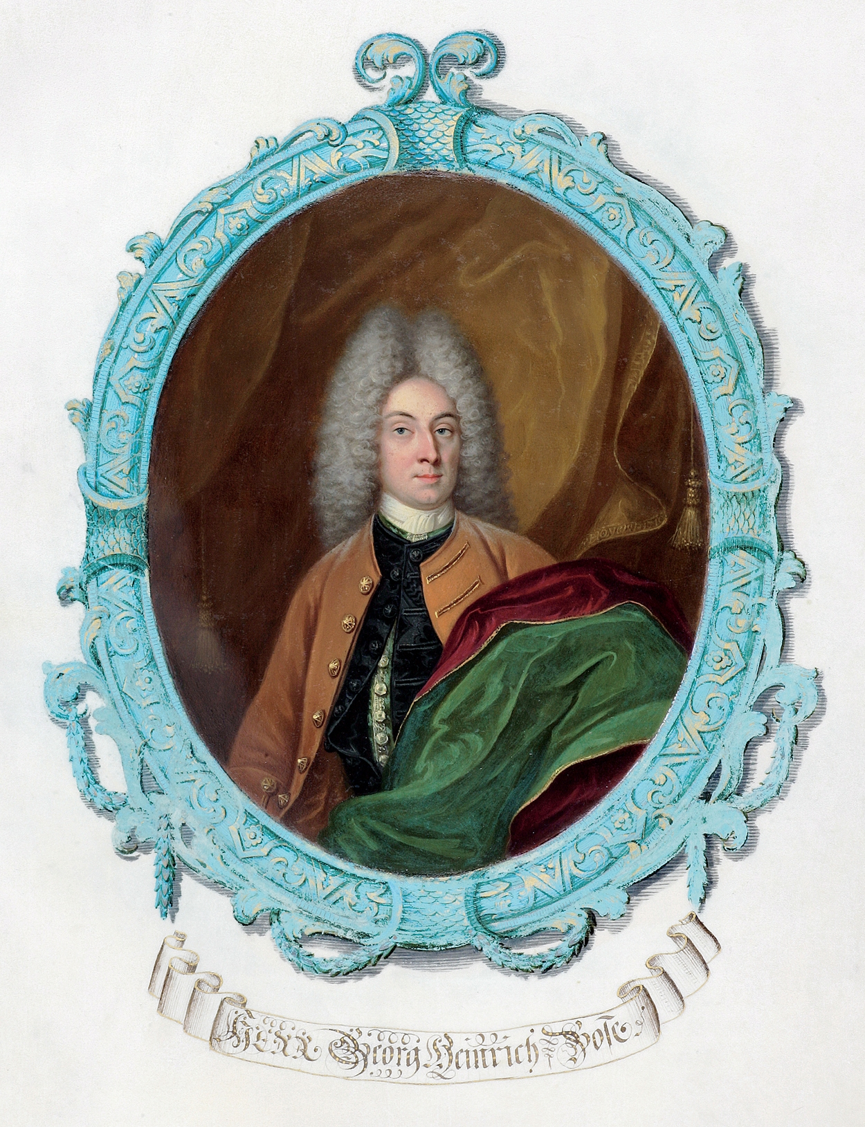 Georg Heinrich Bose, der Namensgeber für das Bosehaus in Leipzig